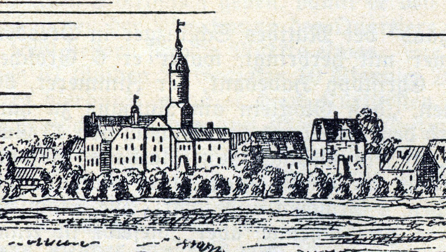 Liebenwerda nach einem Stich vonum 1628 Detail: das Schloss